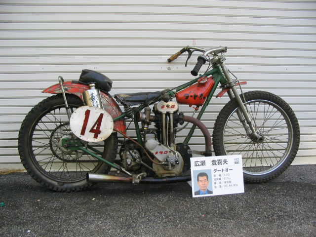 ダート時代のメグロを搭載した競走車『ダートオー』号(広瀬登喜夫氏所有、山陽オートレース場での展示会にて利用者自身が撮影)